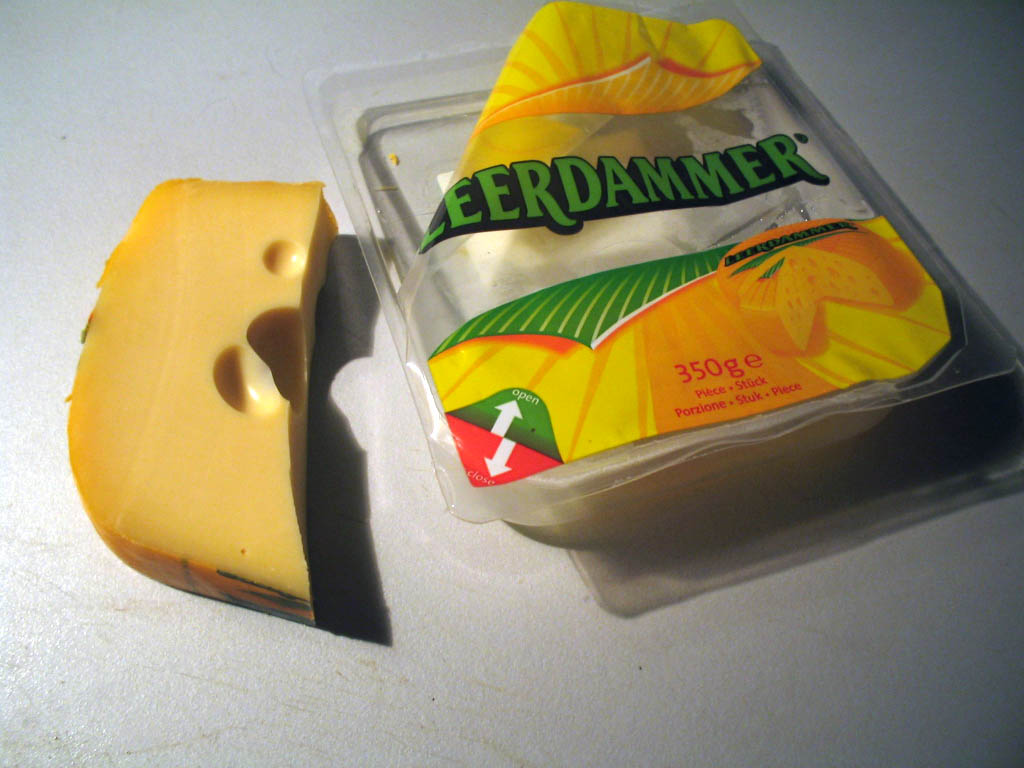 Leerdammer kaas